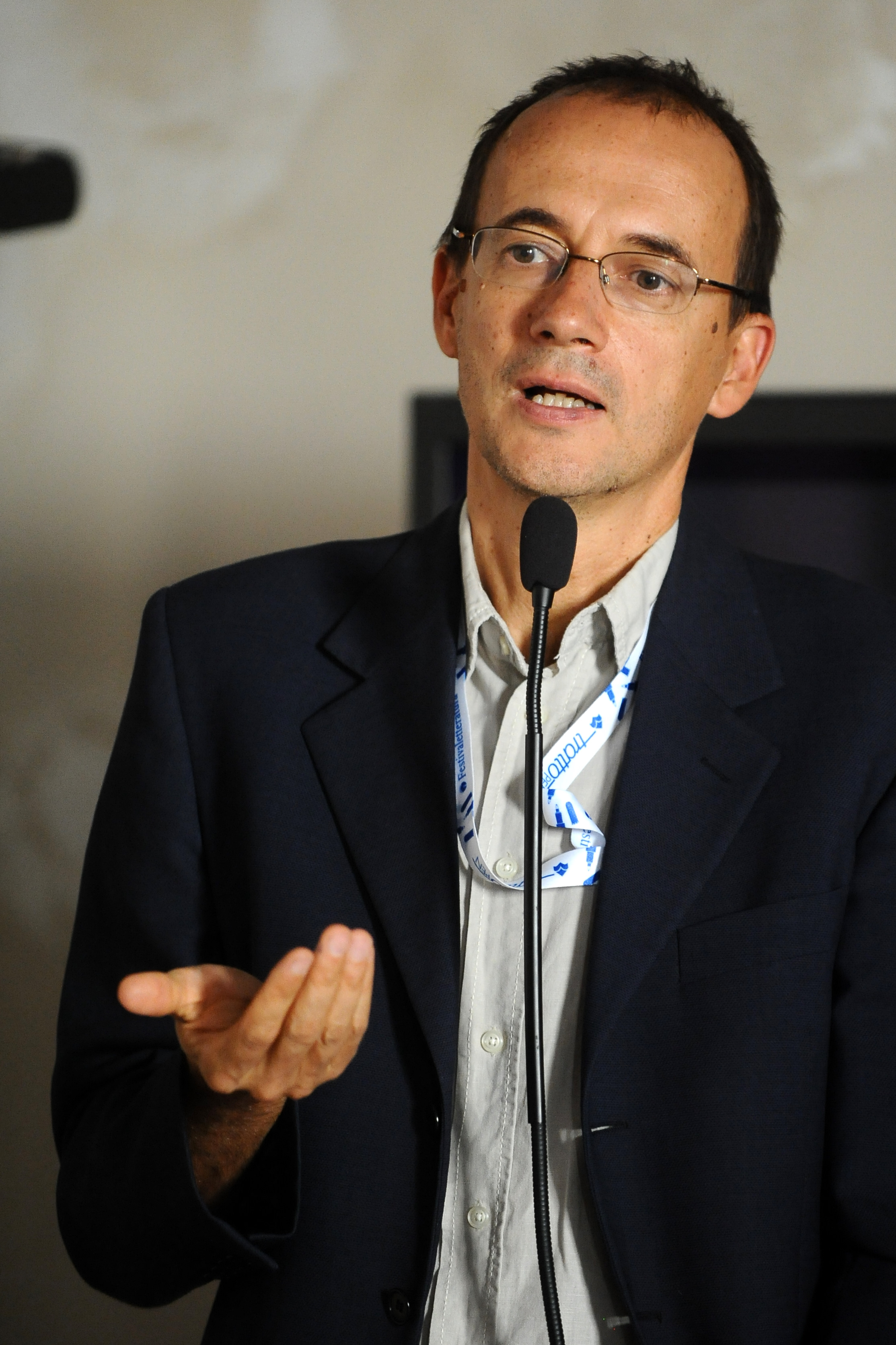 Il filosofo Roberto Casati al Wiki-workshop al Festivaletteratura 2012.